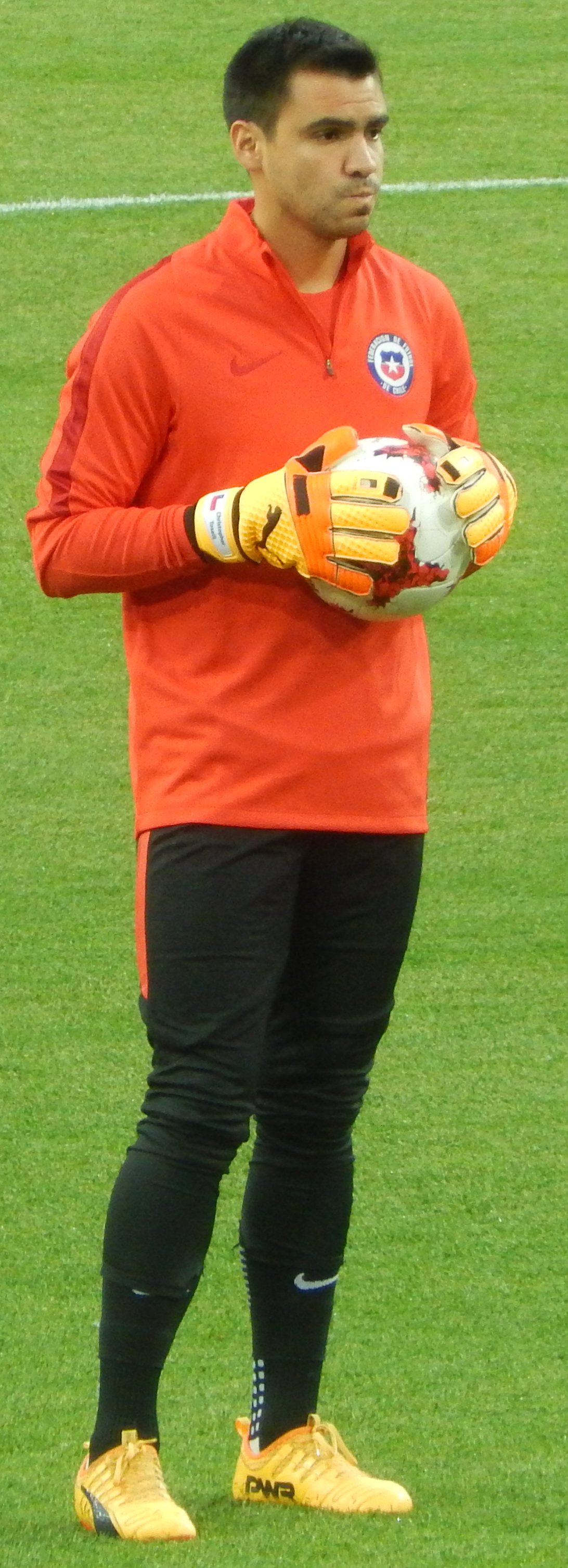 Кристофер Тоселли во время разминки в матче против сборной Камеруна, где он остался на скамейке запасных